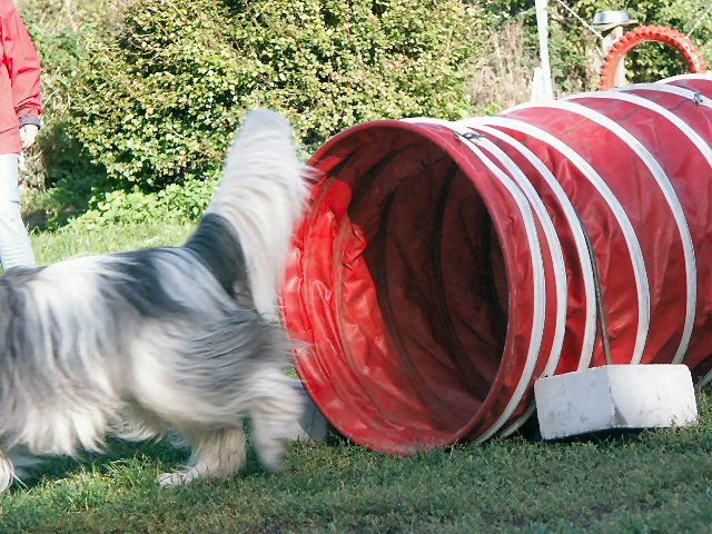 Motiv: Beispiel für Auslöseverzögerung einer Digitalkamera. Ausgelöst wurde, als sich der Kopf des Hundes im Zentrum des Suchers befand, die Aunfahme erfolgte jedoch mit Verzögerung, als sich das Tier bereits aus dem Bildausschnitt herausbewegt hatte. Aufnahmedatum: September 2004 Kamera: Minolta Dimage 7Hi